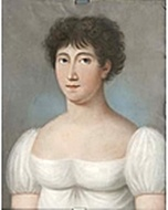 Johann Jacob de Lose (1755-1813), Antonie Leißring, geb. Gräfin Matuschka, Ehefrau des Christian August Joachim Leißring, Frankfurter Schauspieler (1777-1852)